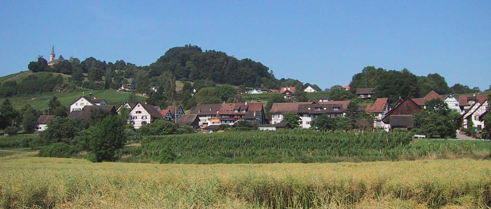 Rüdlingen Kanton Schaffhausen, Schweiz.